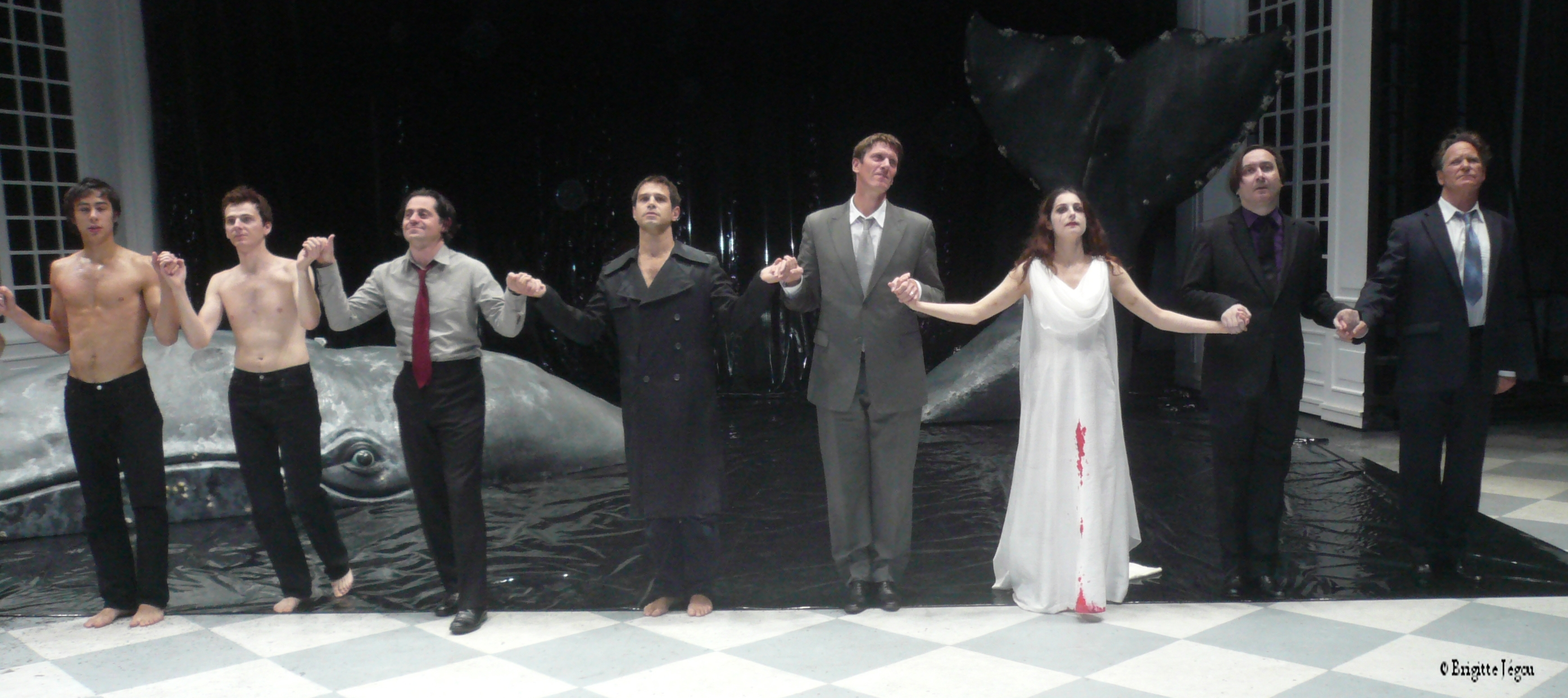 Olivier Py au milieu de ses acteurs après la représentation des Enfants de Saturne. De gauche à droite: Matthieu Dessertine, Frédéric Giroutru, Olivier Py, Nâzim Boudjenah, Philippe Girard, Amira Casar, Michel Fau, Bruno Sermonne.